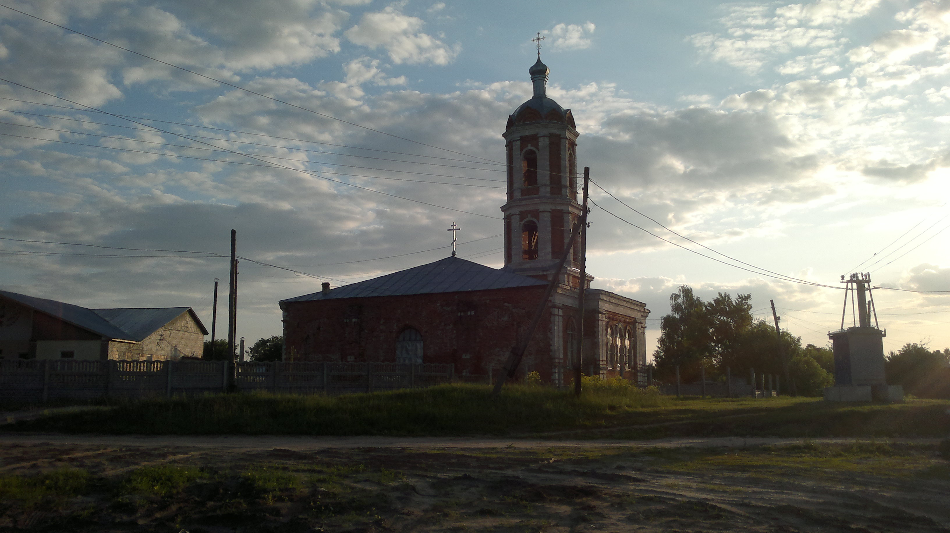 Покровская церковь: Тырново, Шиловский район, Рязанская область